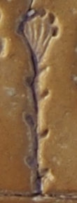 Detail du signe 37 du Disque de Phaistos montrant clairement la couronne de points